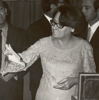 Reunión del grupo literario cubano Casa de las Américas